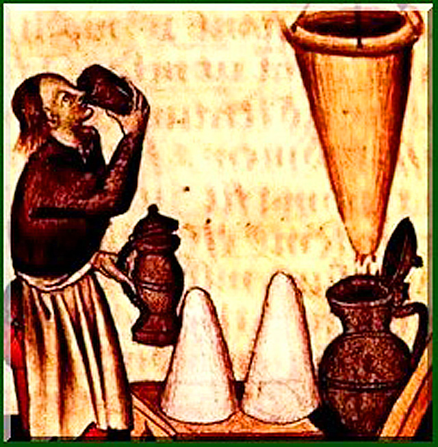 Fabrication et dégustation de l'hypocras au Moyen Age